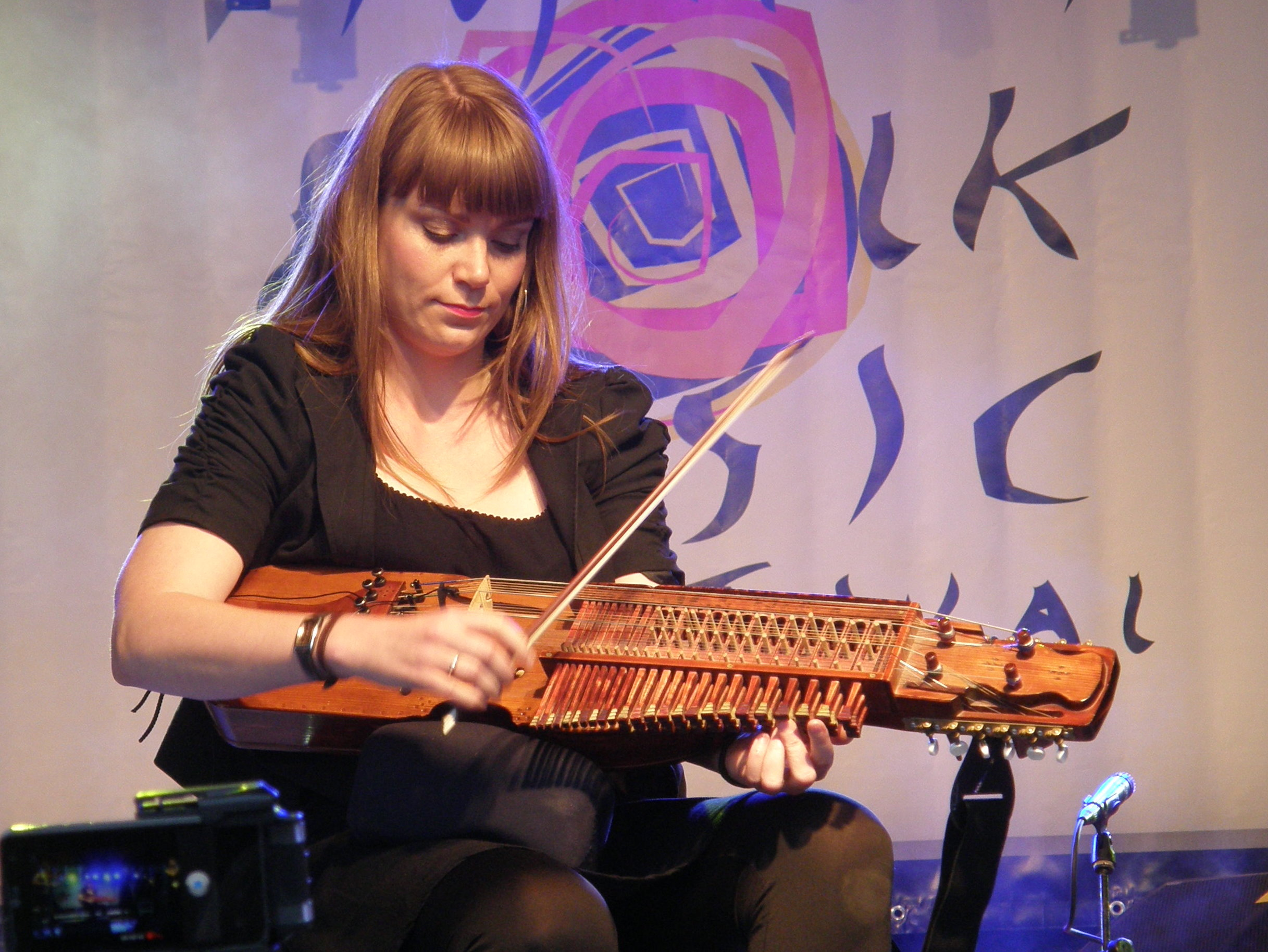 Emilia Amper mängimas nyckelharpat Viljandi Folgil